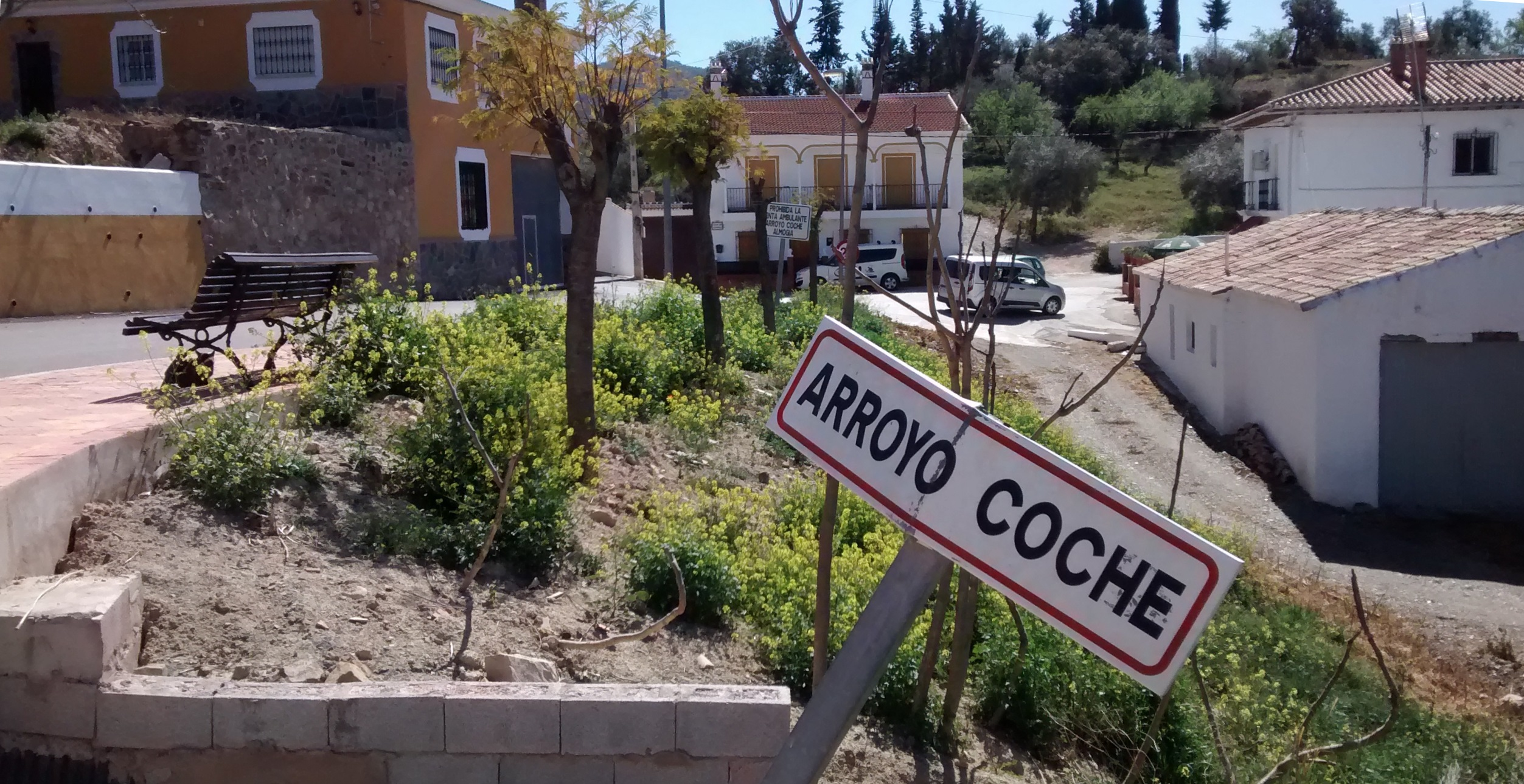 Aldea de Almogía en la Provincia de Málaga - España